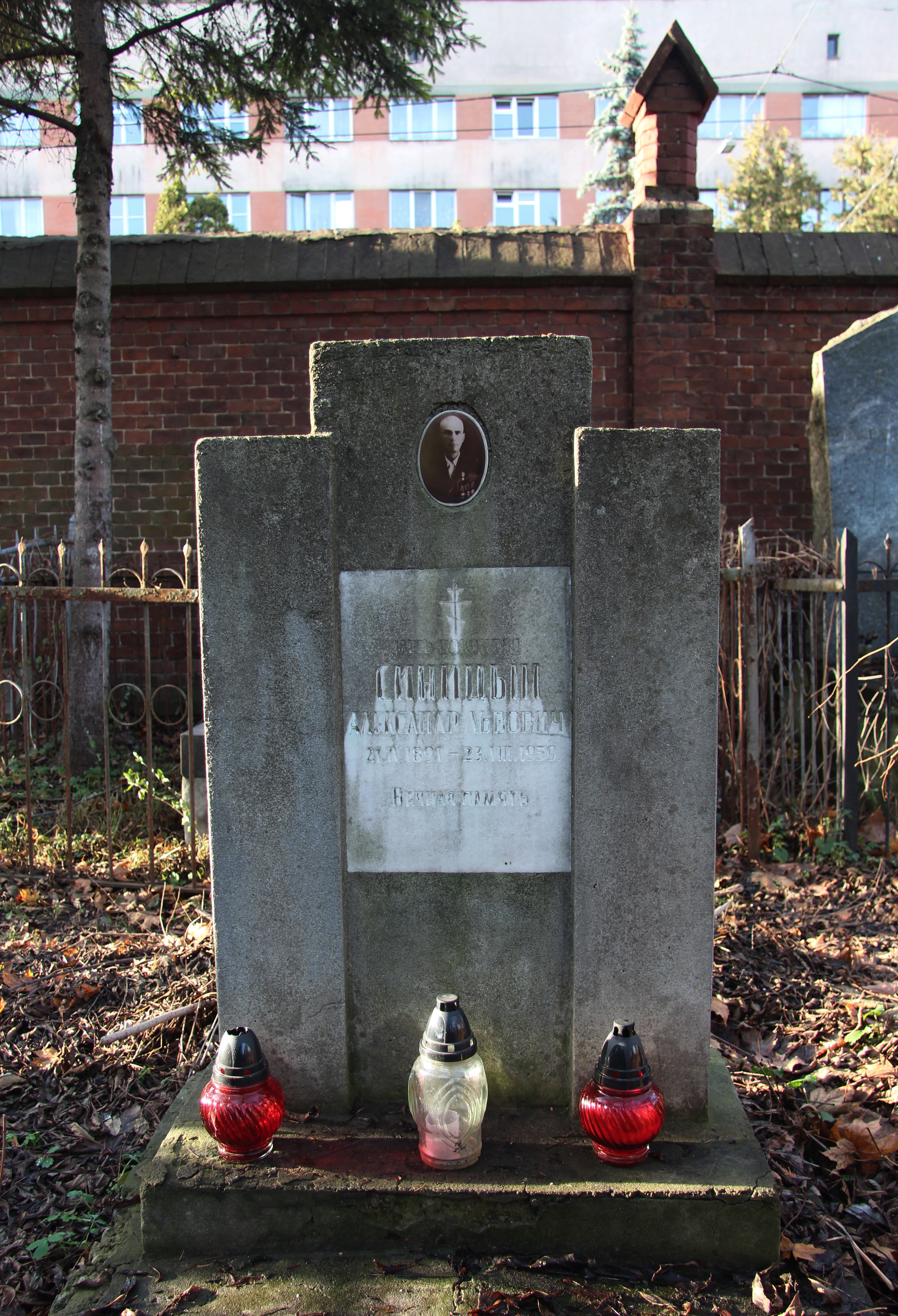 Пам'ятник на могилі Героя Соц. праці О. Л. Синіцина. Личаківський цвинтар , поле № 1.